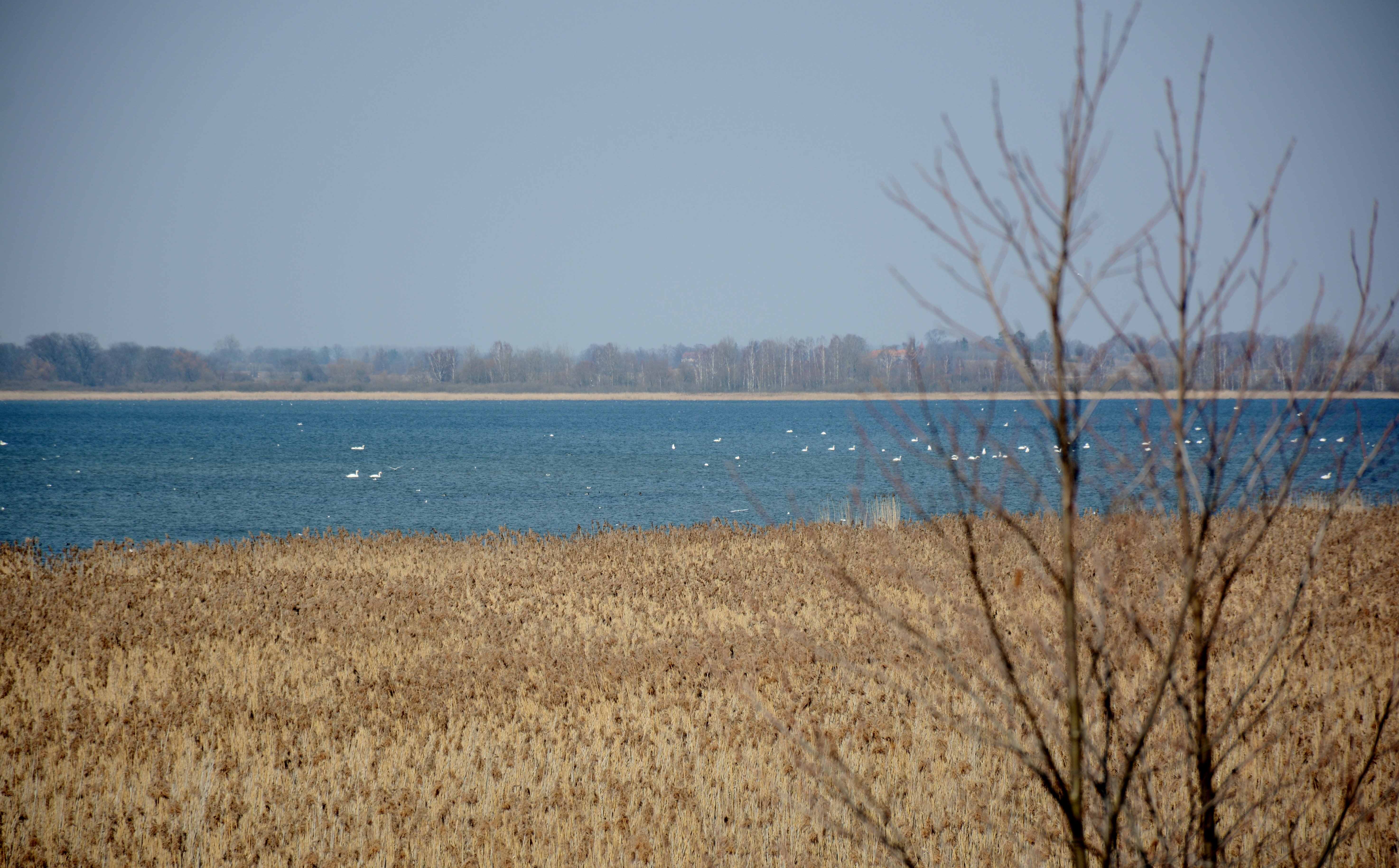 Luknajno,Gmina-Mikolajki,Polska,UE.